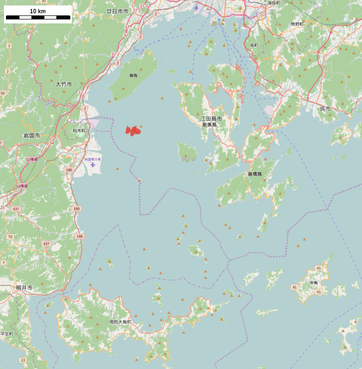 広島県大竹市の阿多田島周辺 This map may be incomplete, and may contain errors. Don't rely solely on it for navigation.